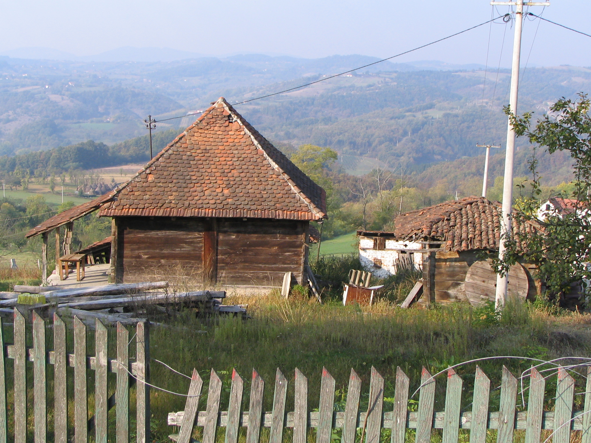 Горња Горевница (фото: Михаило Грбић)